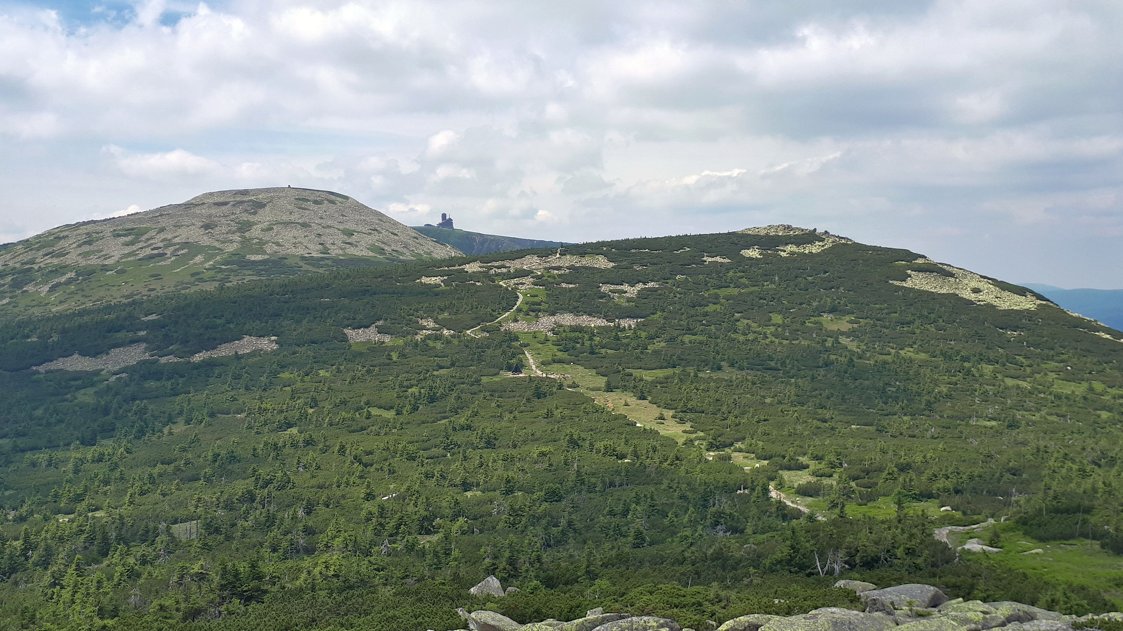 Czarna przełęcz widziana z Czeskich Kamieni